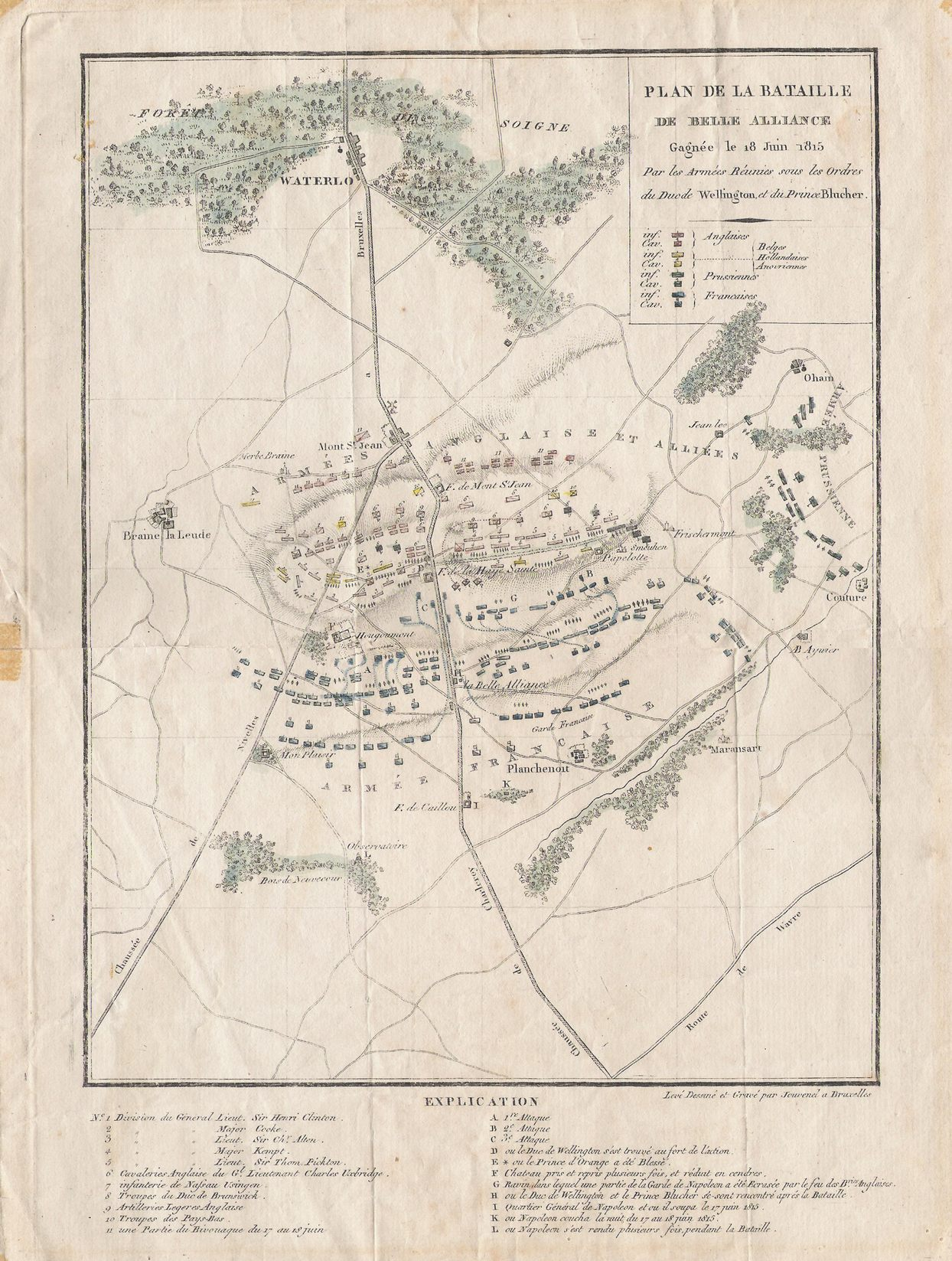 Gravure de I. Jouvenel (1773-1851?), Plan de la Bataille de Belle Aliance (Waterloo)